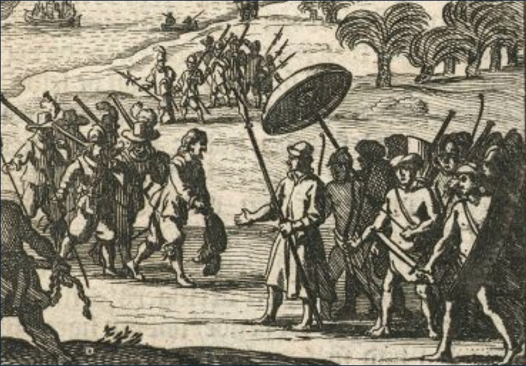 Aankomst van Sebald de Weert in Matecalo